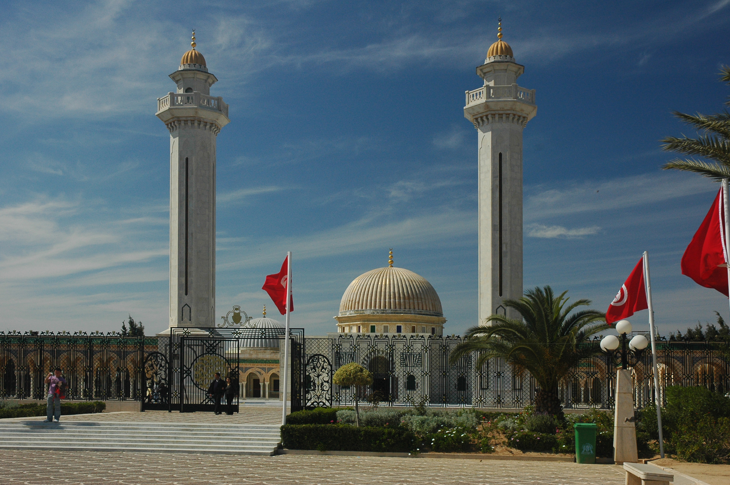 Mausolée Habib Bourguiba à Monastir en Tunisie